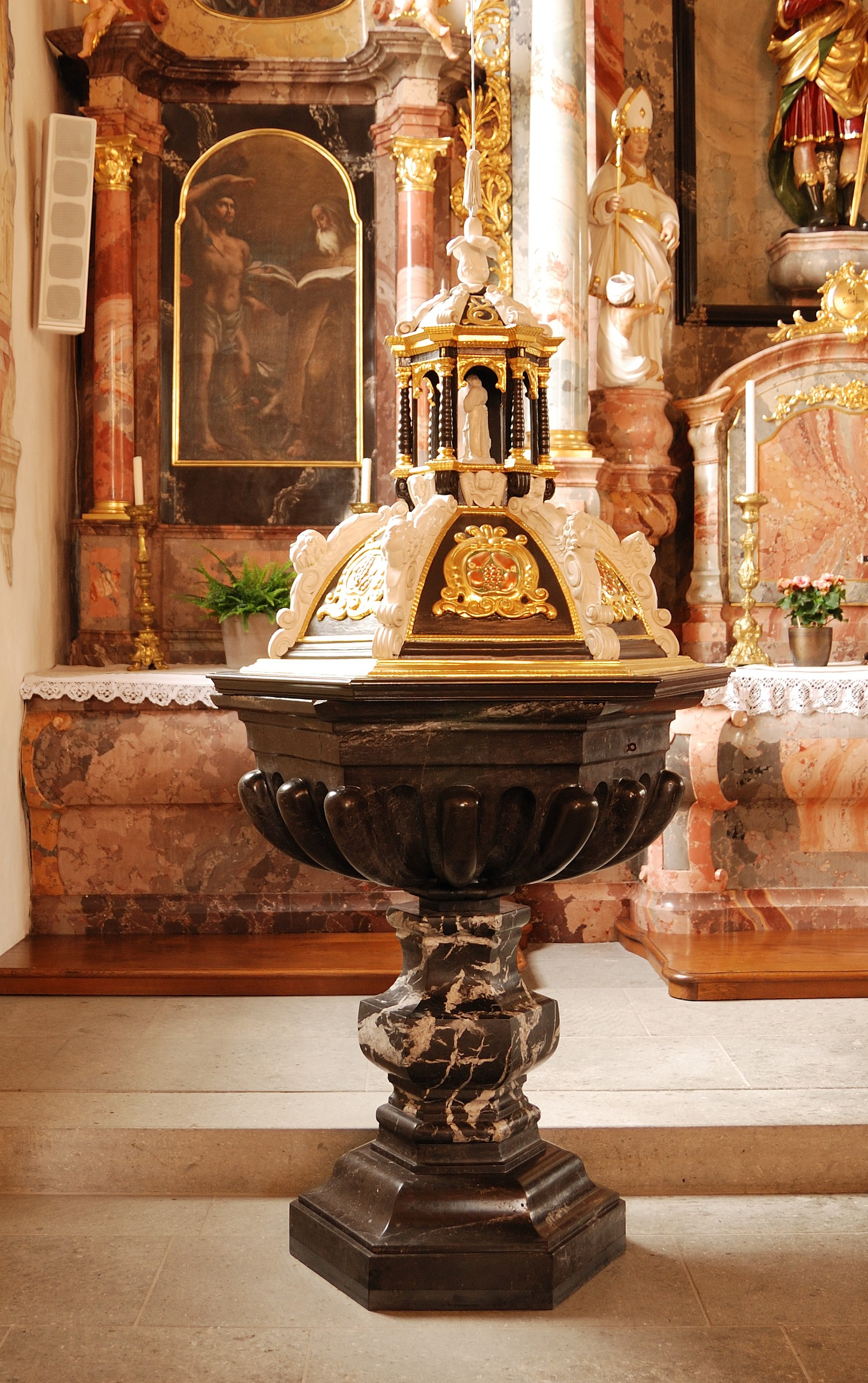 Stadtkirche Bremgarten: Taufstein